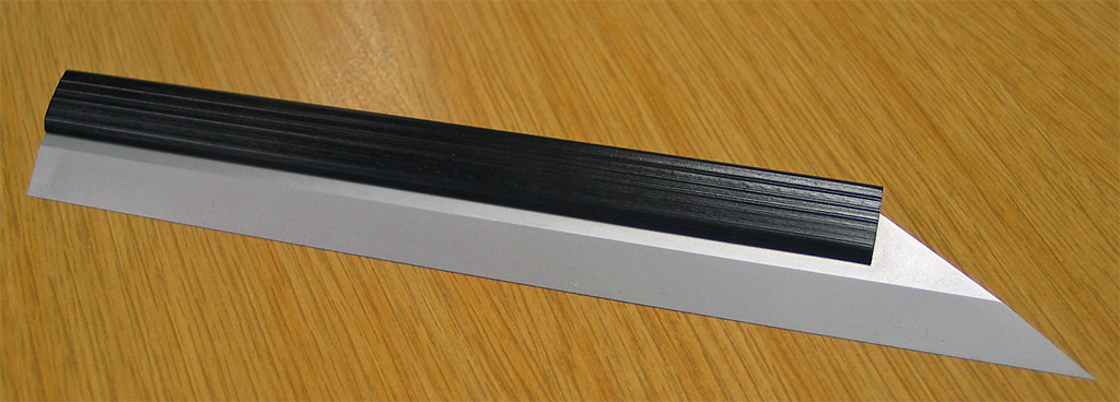 hairline gauge